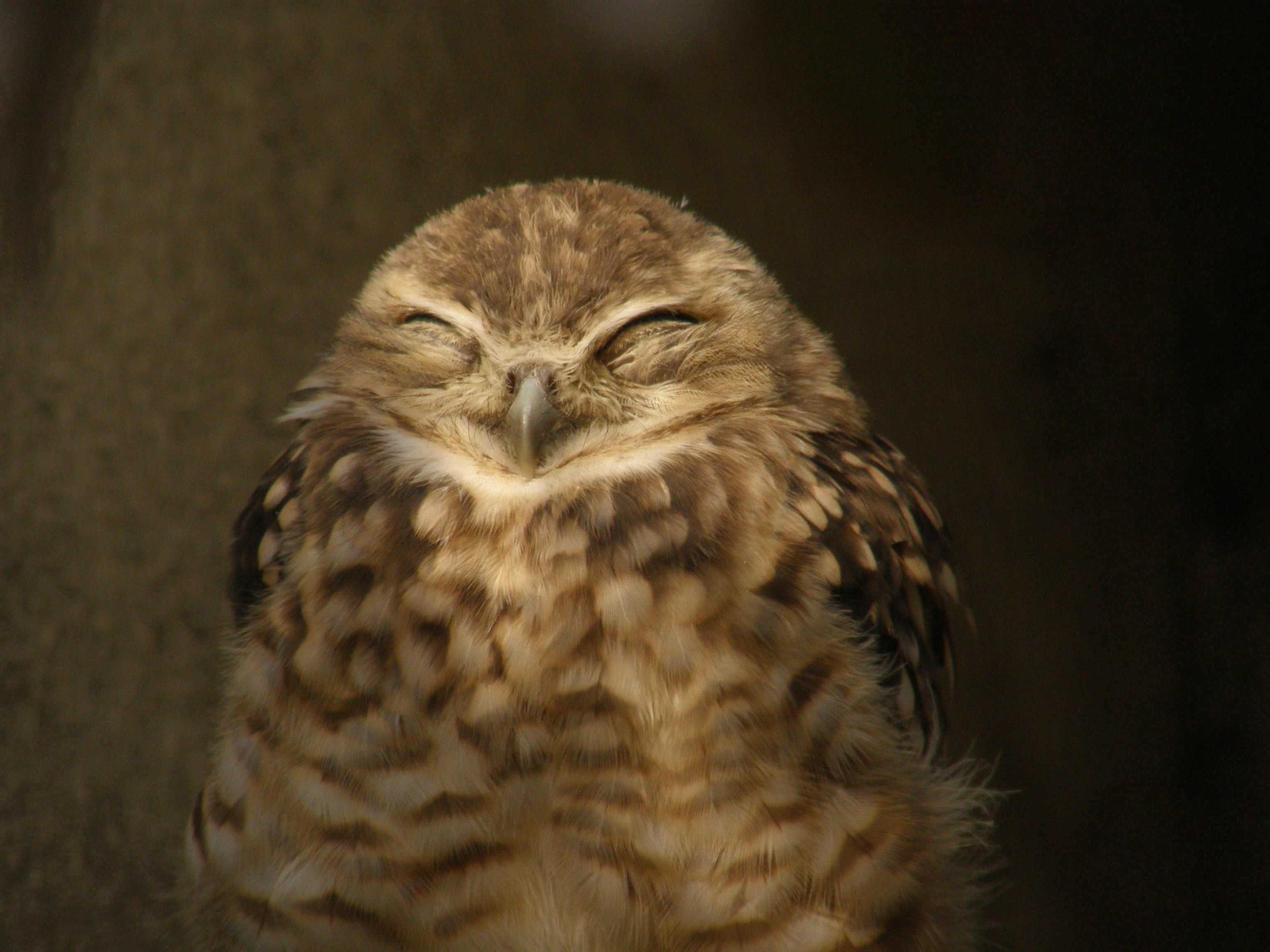 konijnuiltje (Athene cunicularia)